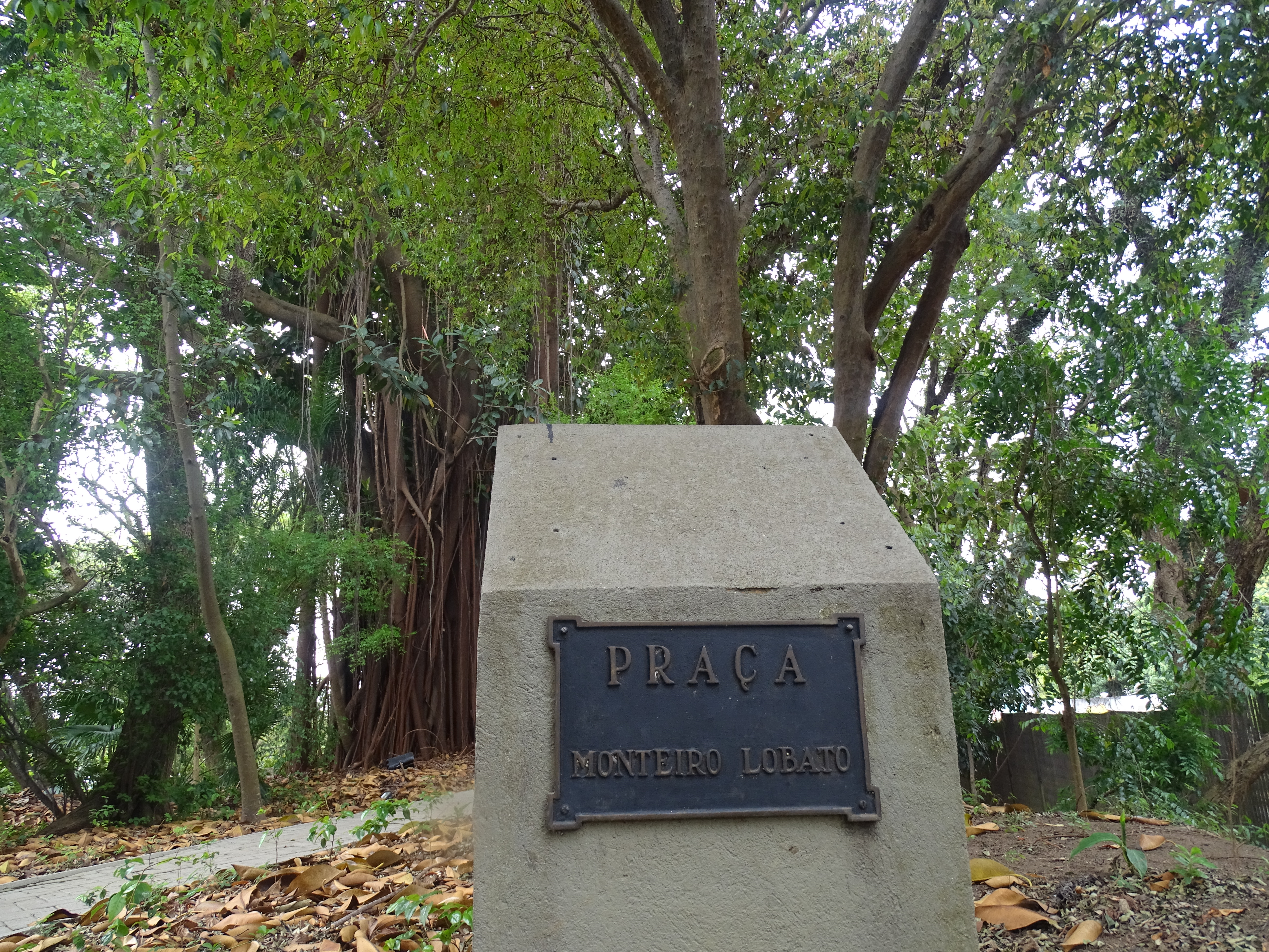 A área da livre da casa do bandeirante se tornou uma praça pública chamada Monteiro lobato. Nela, há lugar para andar, descansar e parquinho para crianças.